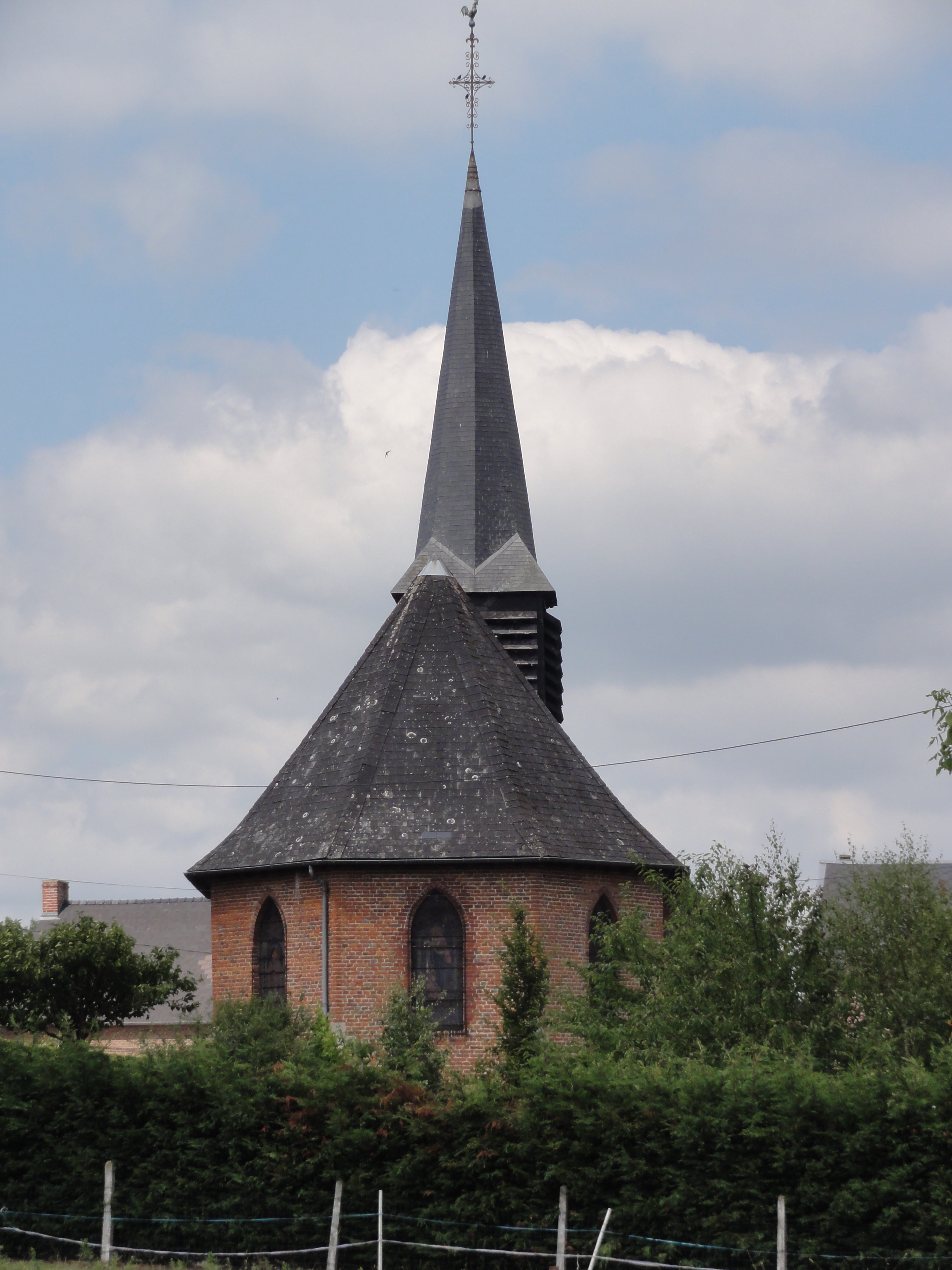 Barzy-en-Thiérache (Aisne, Fr) église, chevet